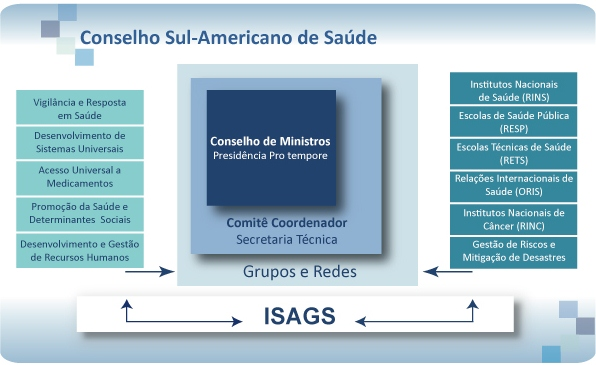 Organograma do CSS/Unasul